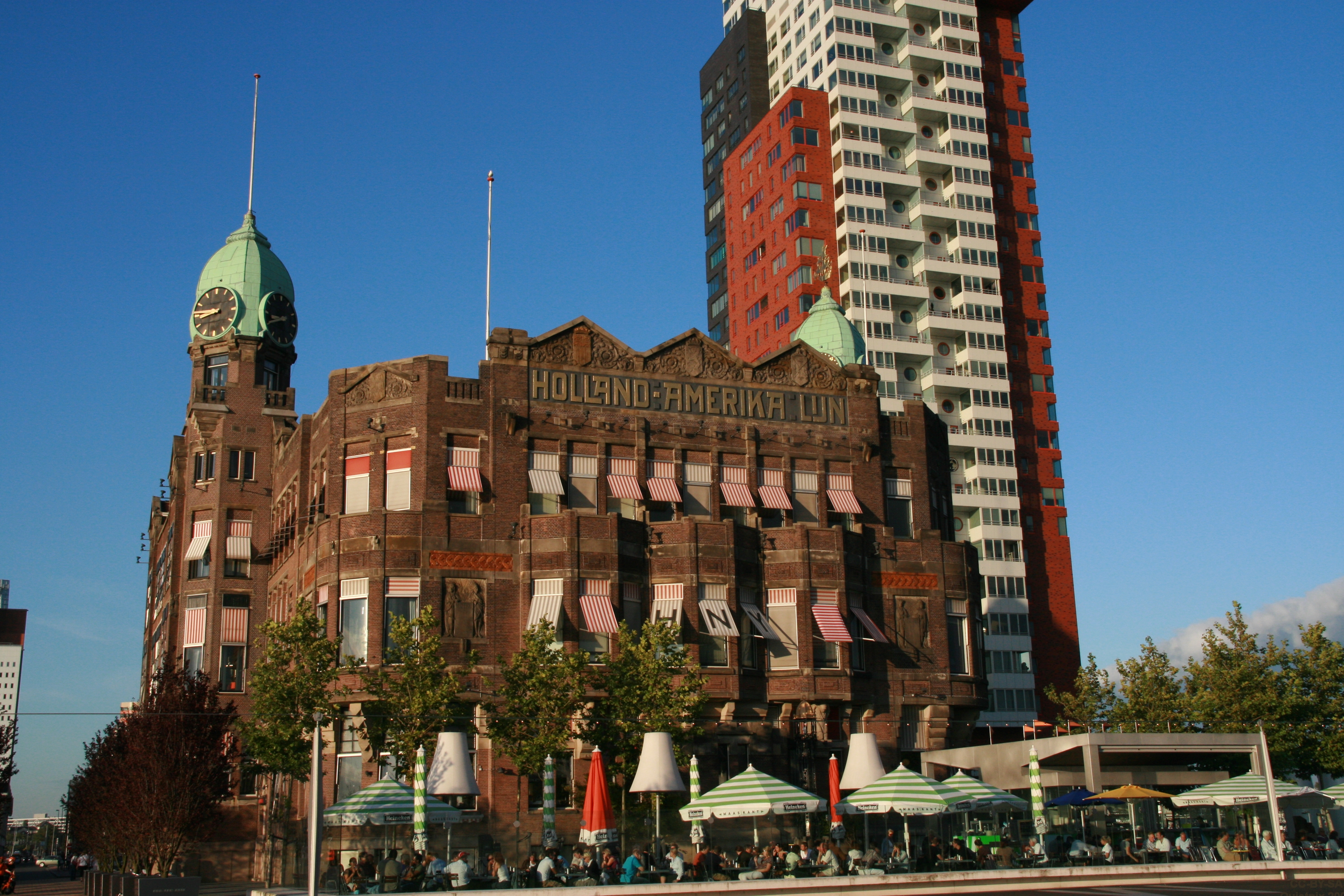 Rotterdam: Hotel New York (voormalig gebouw van de Holland America Line)